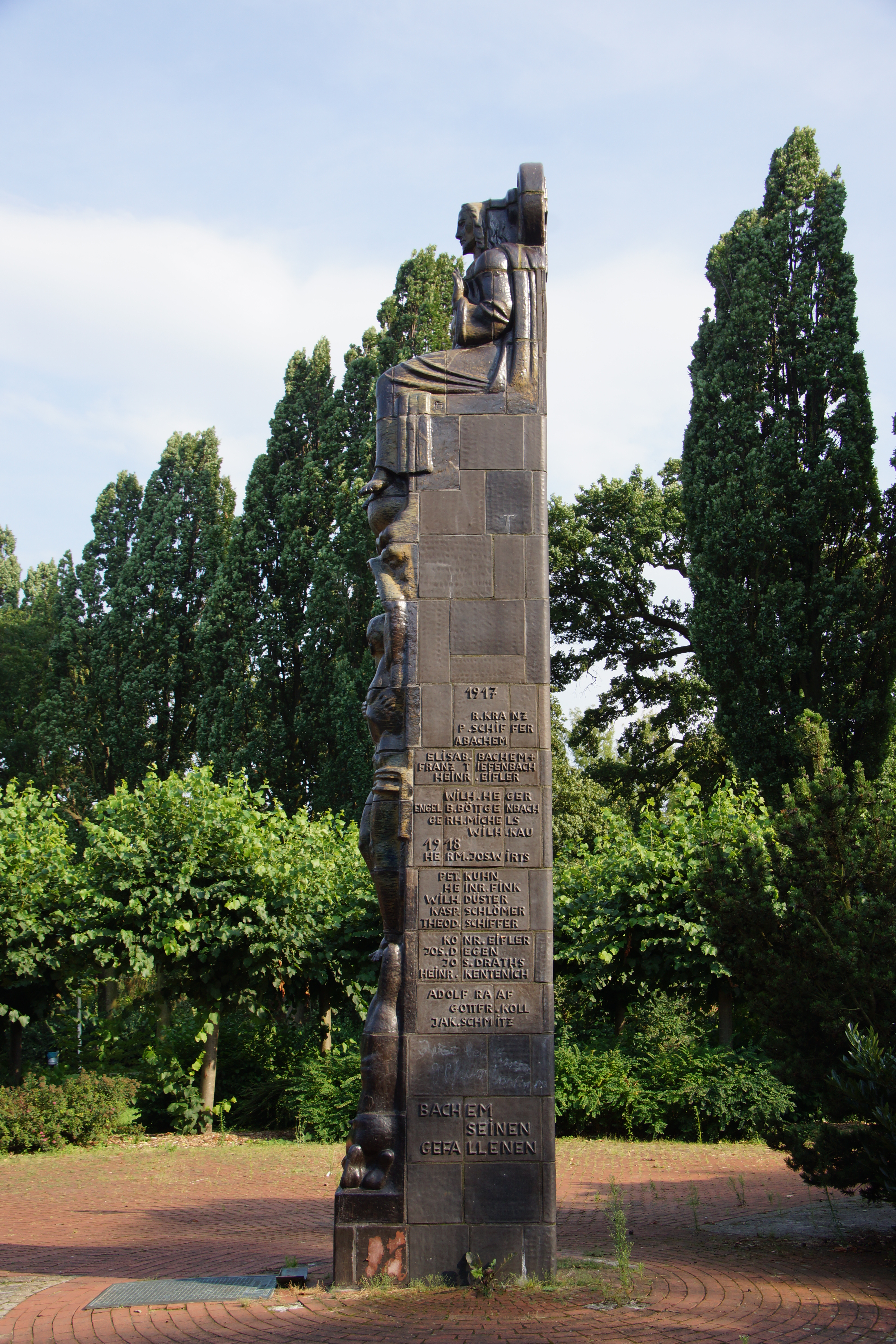 Kriegerdenkmal in Bachem This is a photograph of an architectural monument. 58